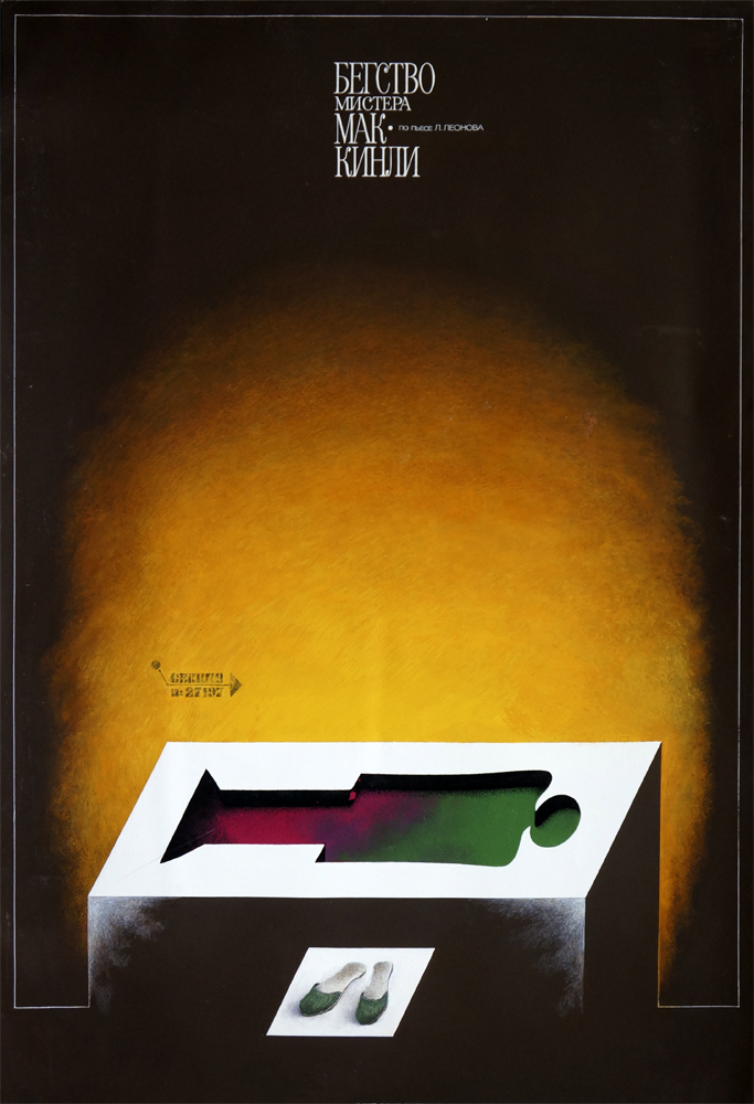 Плакат художника Вячеслава Францевича Стримайтиса